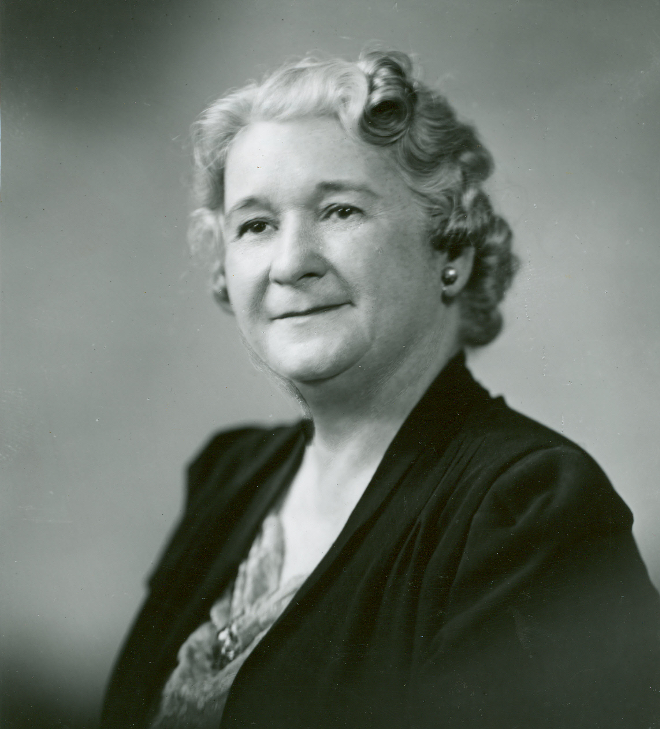 Willa Fuller from